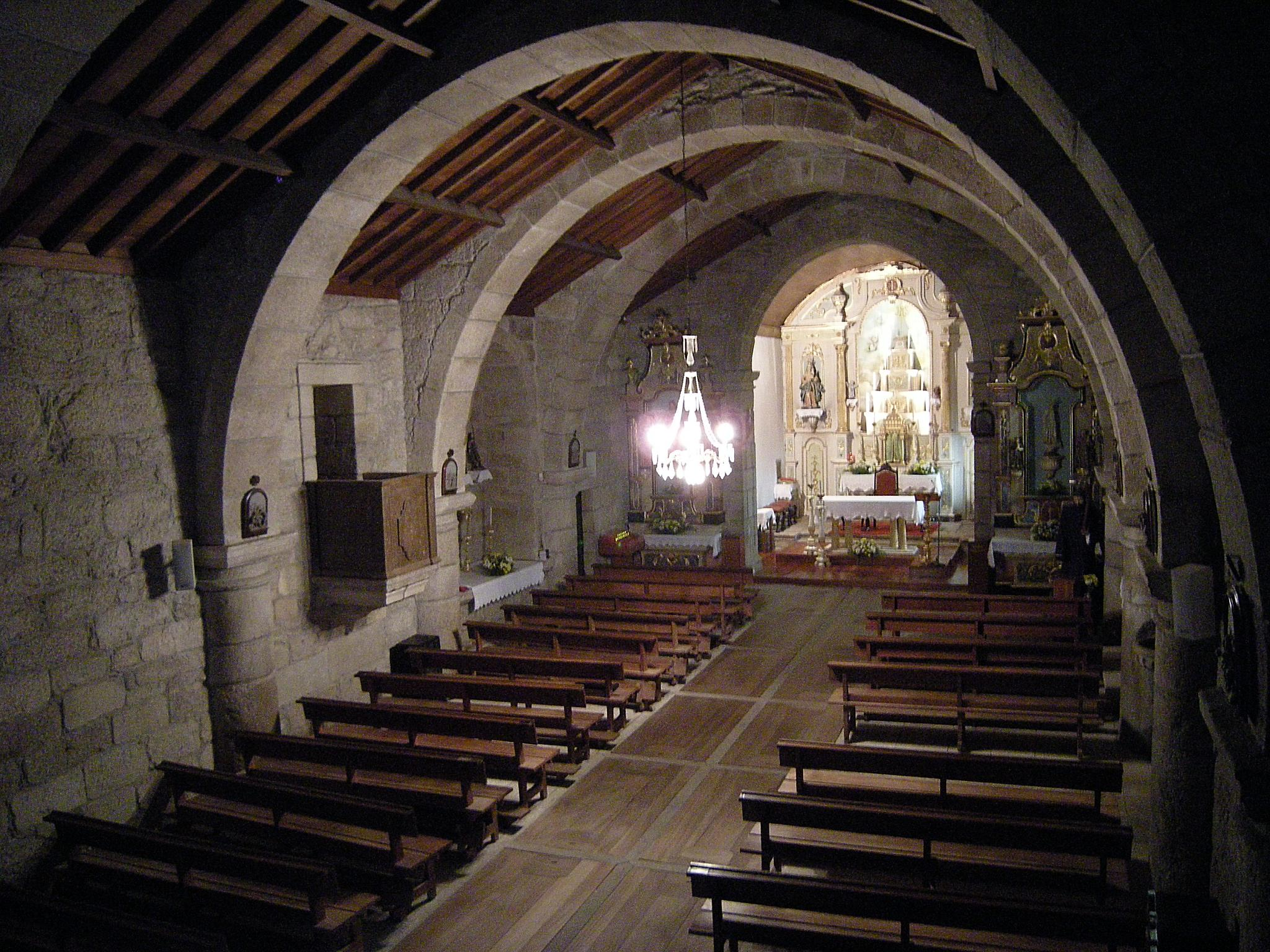 Interior de la iglesia desde el coro alto. Esta foto participó en el juego En un lugar de Flickr.